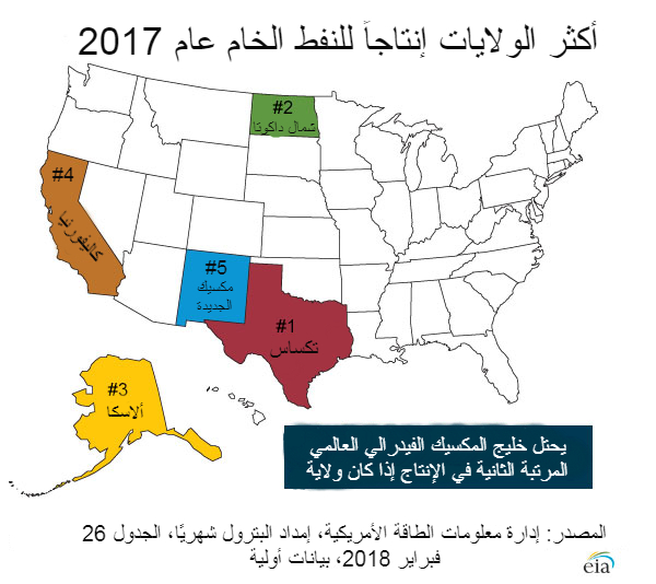 أكثر 5 ولايات إنتاجاً للنفط في الولايات المتحدة